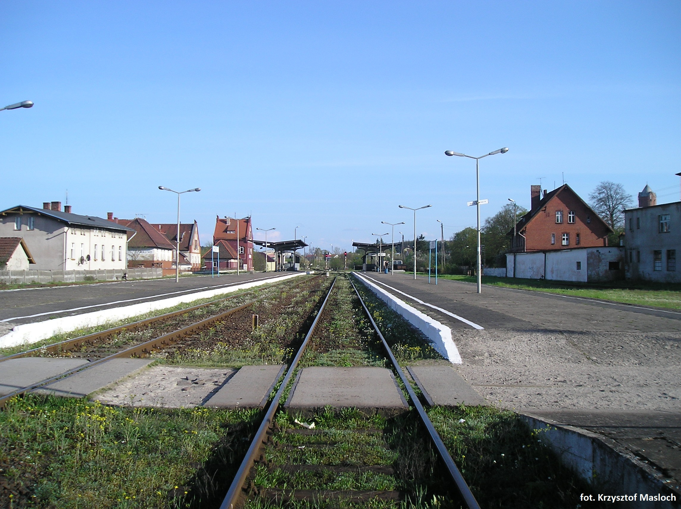 Dworzec kolejowy w Miastku: perony Na pierwszym planie tor w kierunku Szczecinka